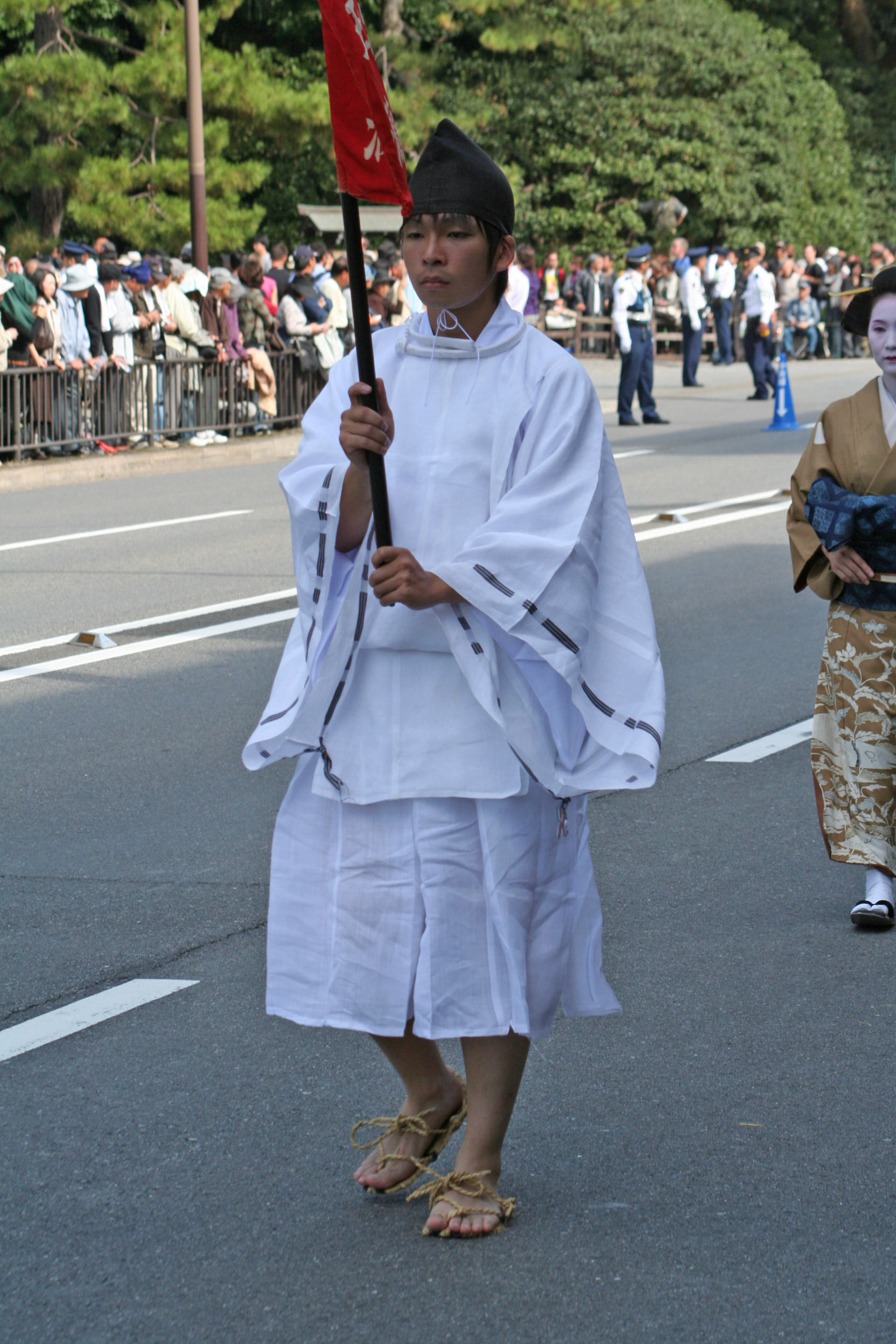 京都府京都市にて開催された時代祭。正午の御所から平安神宮までの行進の様子。2009年10月22日撮影。